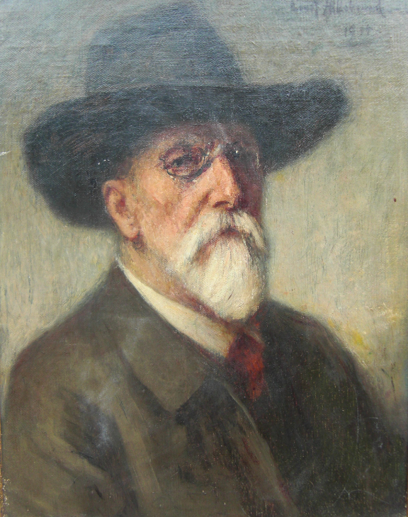 Selbstbildnis als 81-jähriger